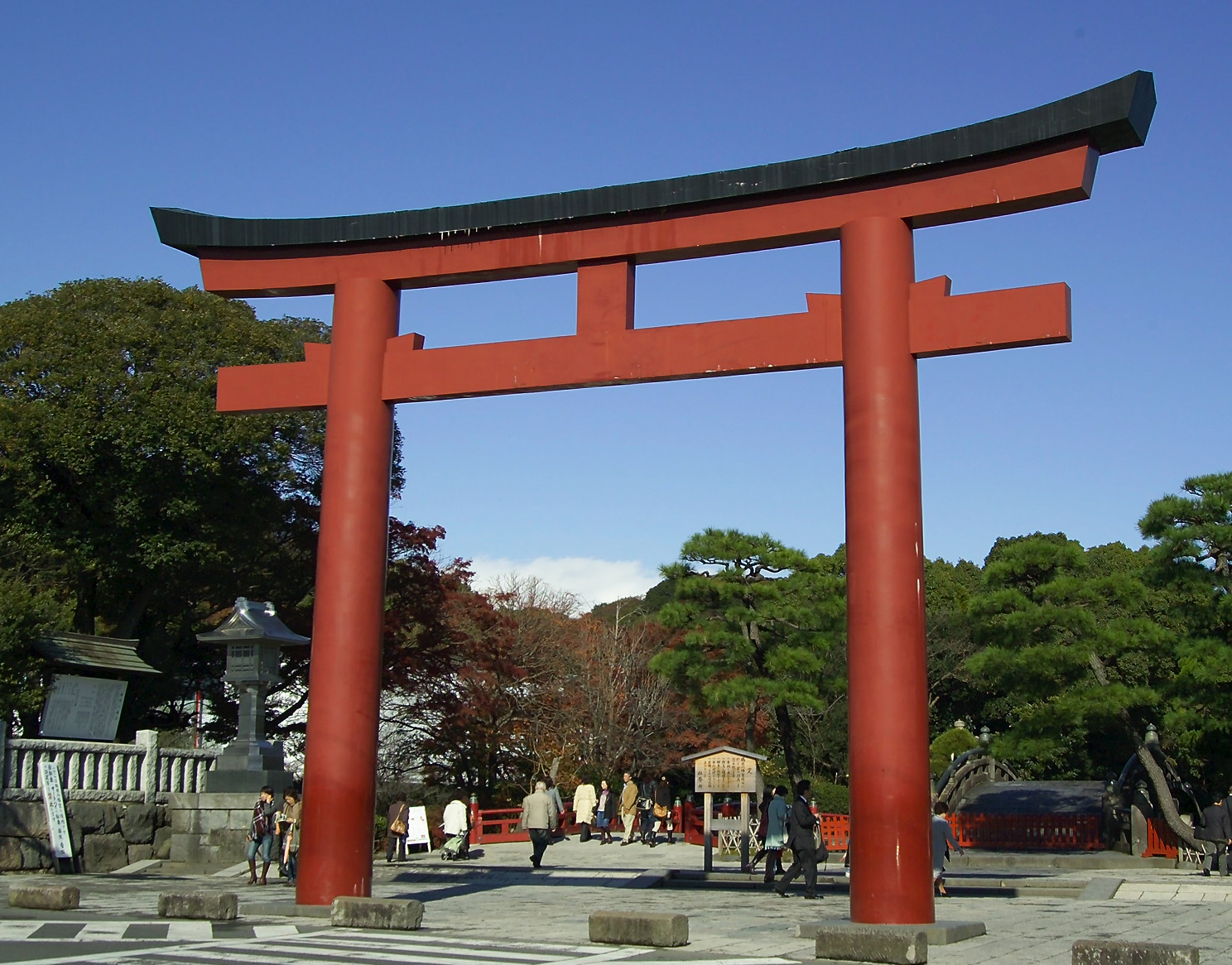 Torii at Tsurugaoka Hachiman Shrine in Kamakura, Japan